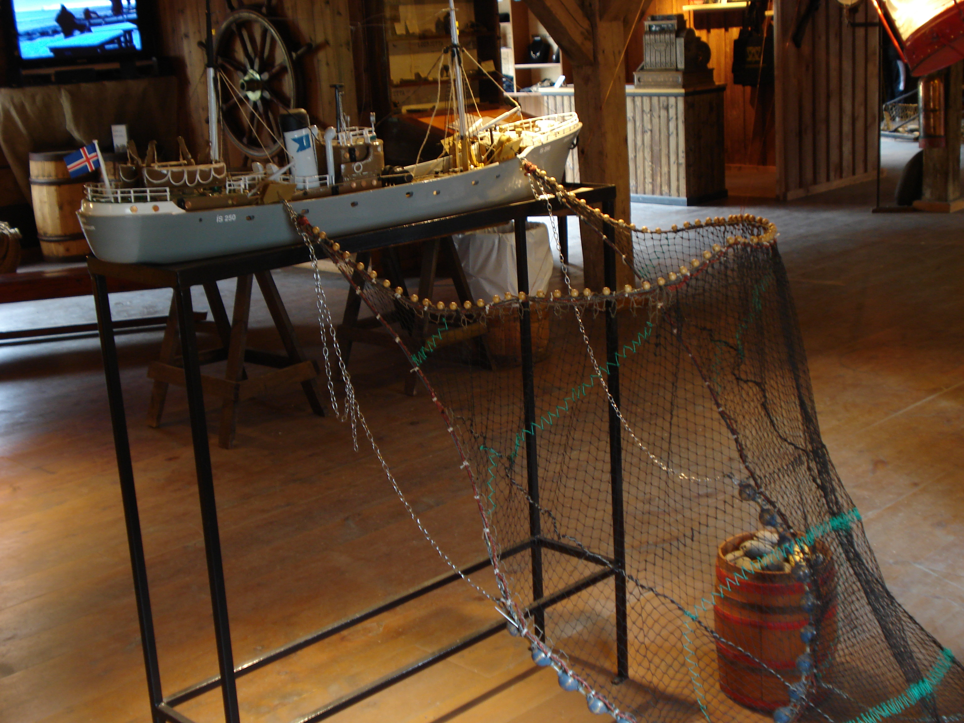 Trawler Fishing, Ísafjörður, Iceland